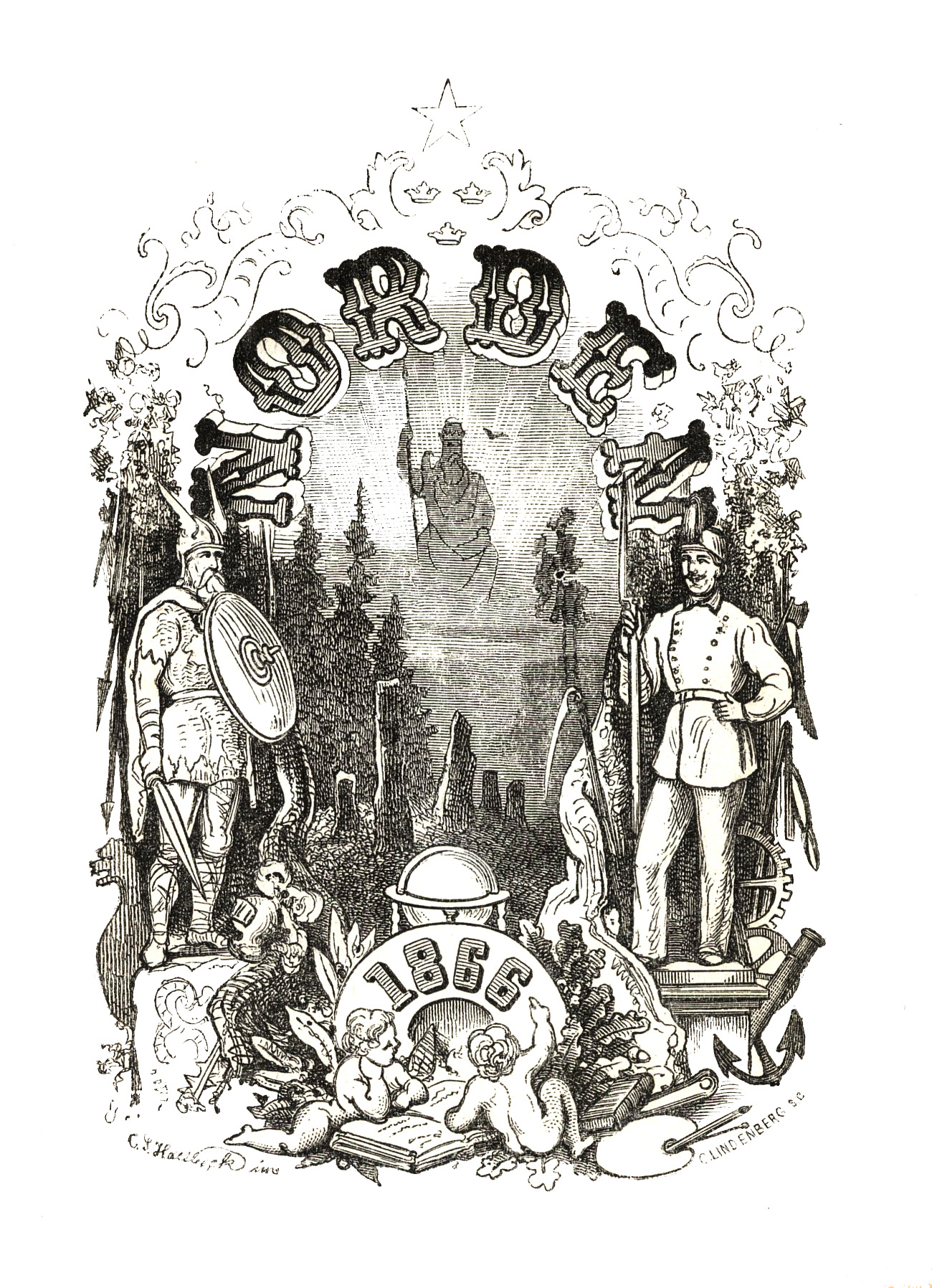 Norden. National-kalender. Titelplansch